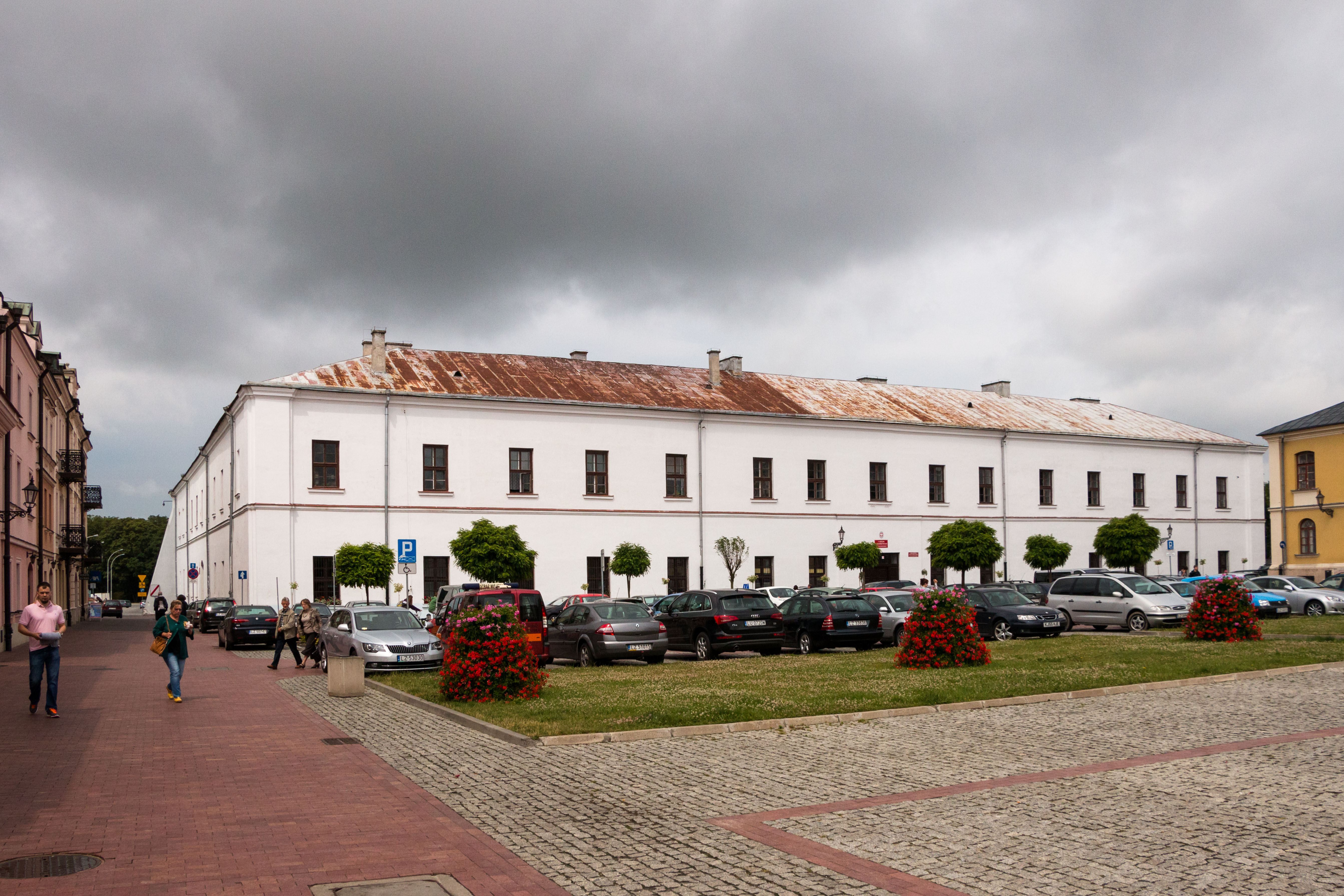 Zamość, Akademia Zamojska (1639-48 r., XVIII w., 1825 r.)